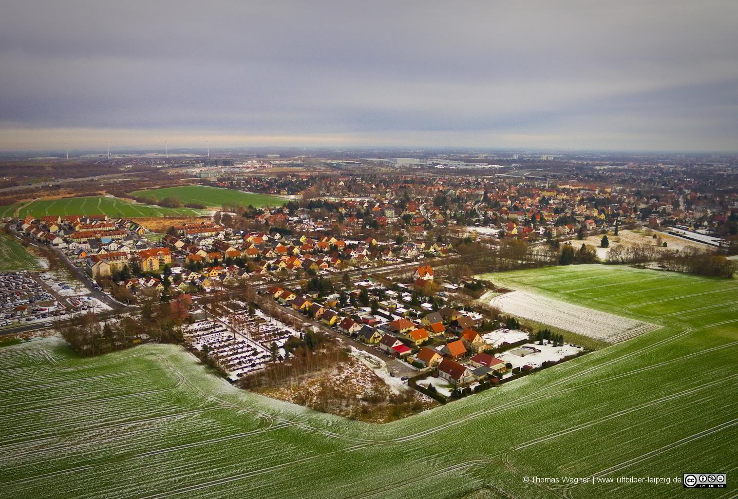 Wiederitzsch, Leipzig, Luftbild mit Drohne an einem Wintertag.